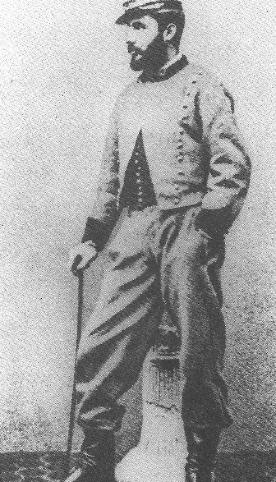 Pittore e patriota italiano